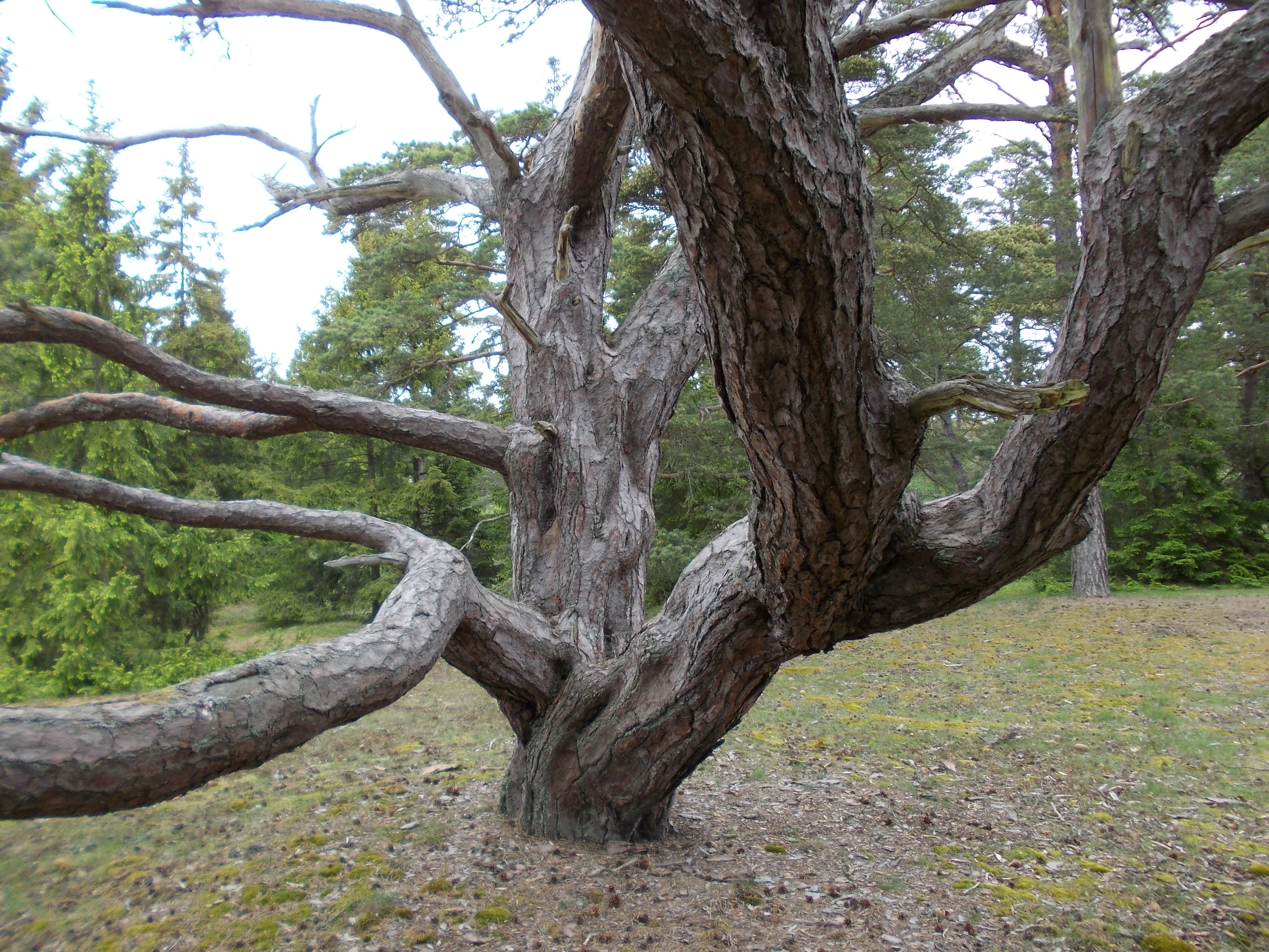 En martall i Danbo naturreservat på Gotland.